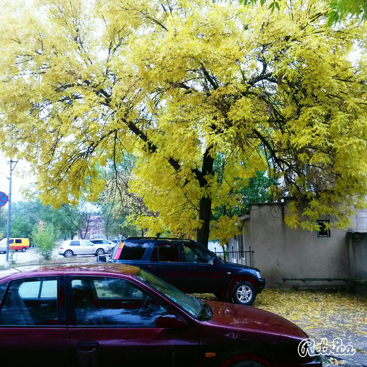 Осень в нашем городке